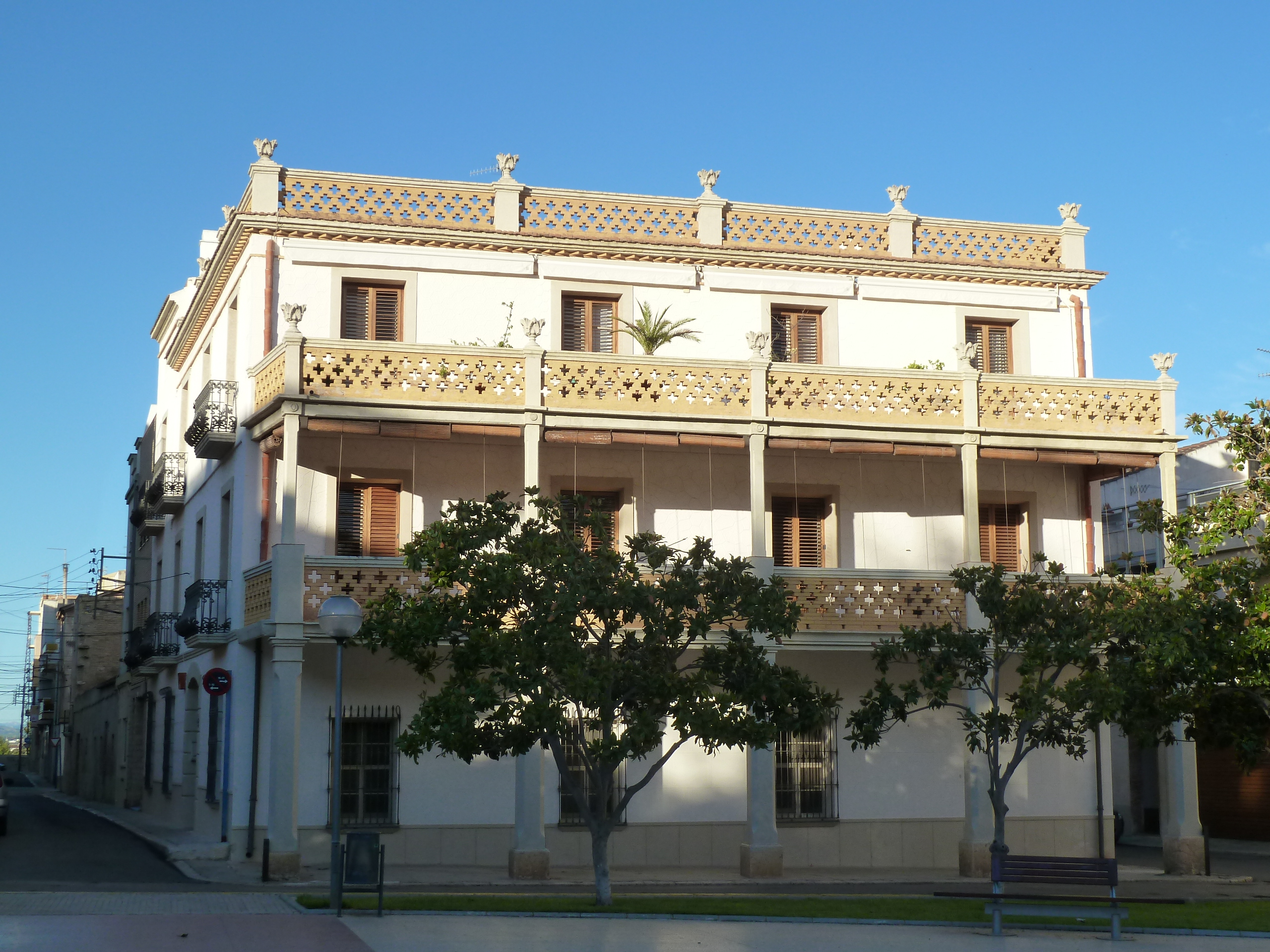 Amposta